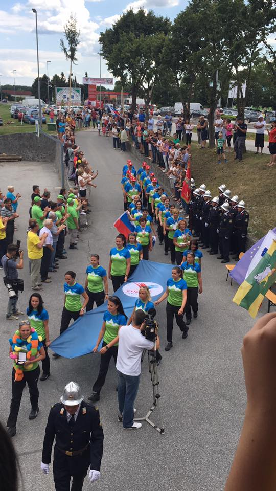 PGD Hajdoše, 2017